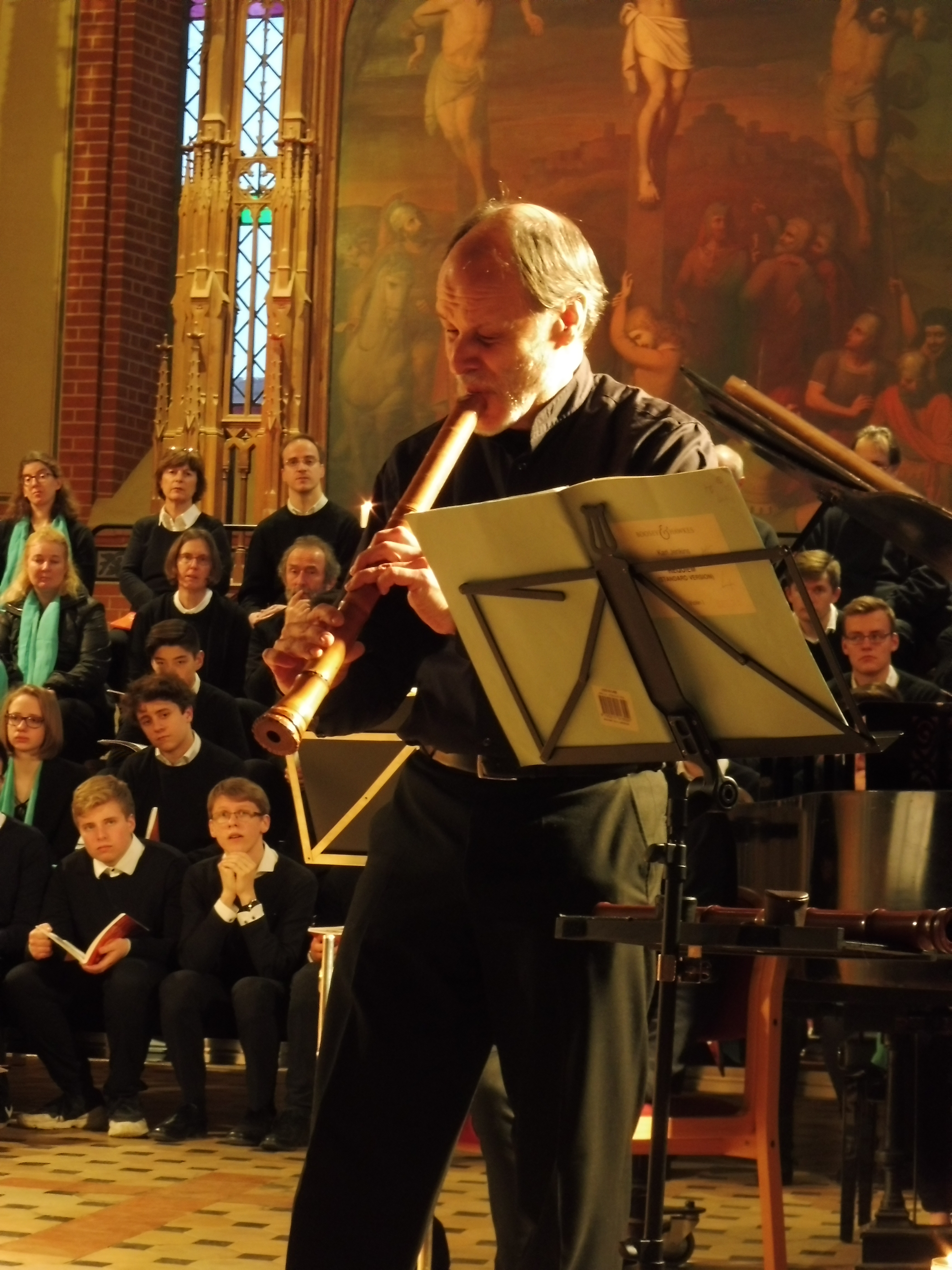 Dr. Jim Franklin beim Blasen der Shakuhachi in der Plauer Marienkirche